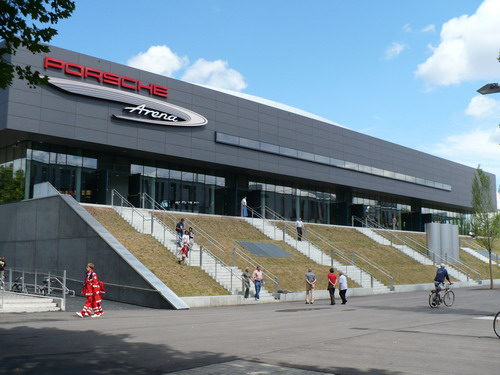 Südfront Porsche Arena in Stuttgart